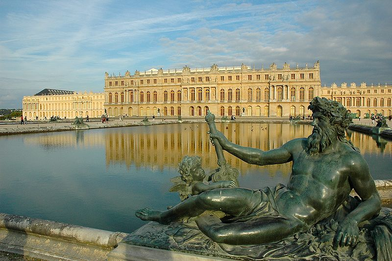 Дворац у Версају (1661-1710)